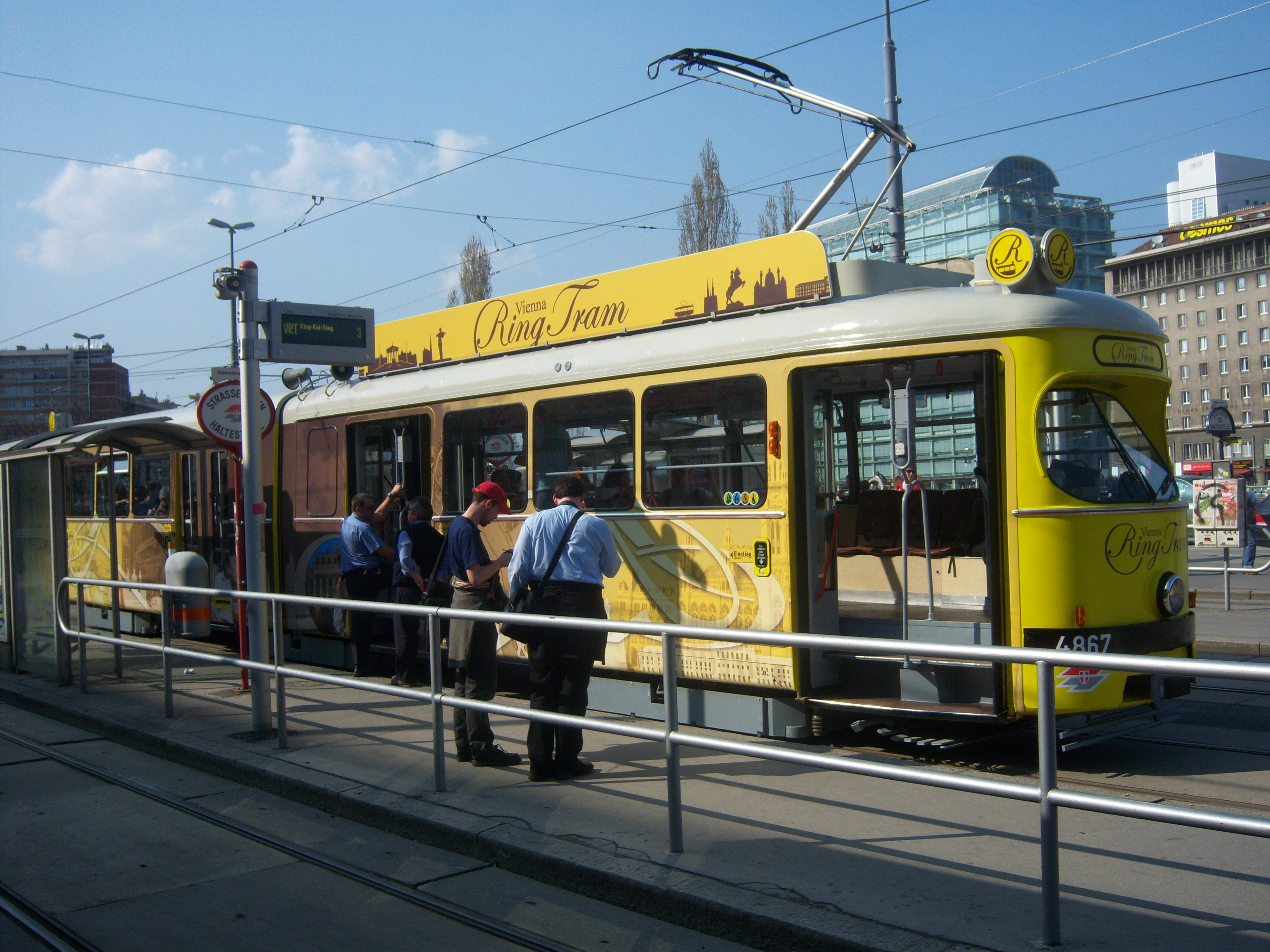 Vienna Ring Tram